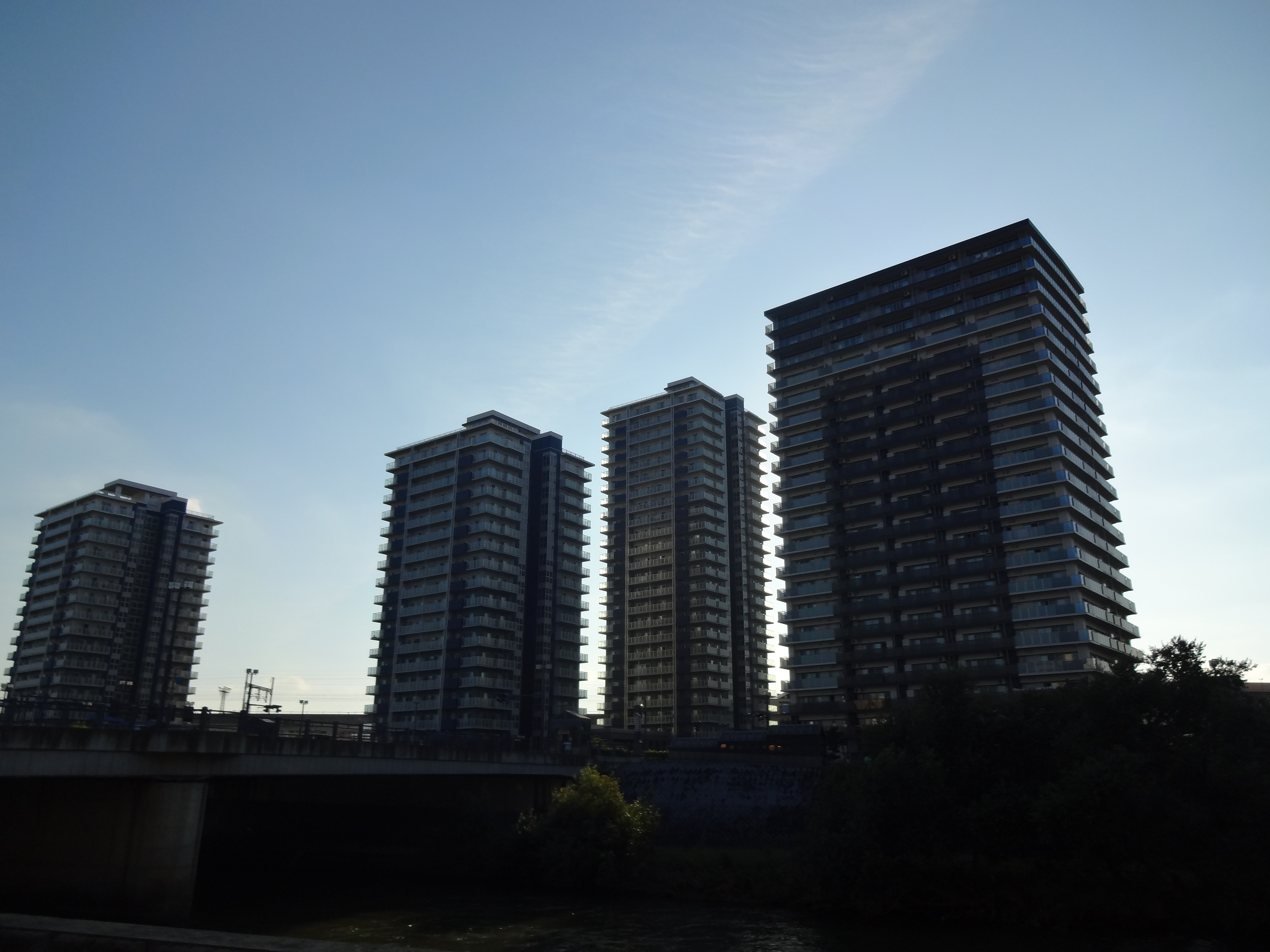 盛岡市の盛岡駅前に存在するタワーマンションです。